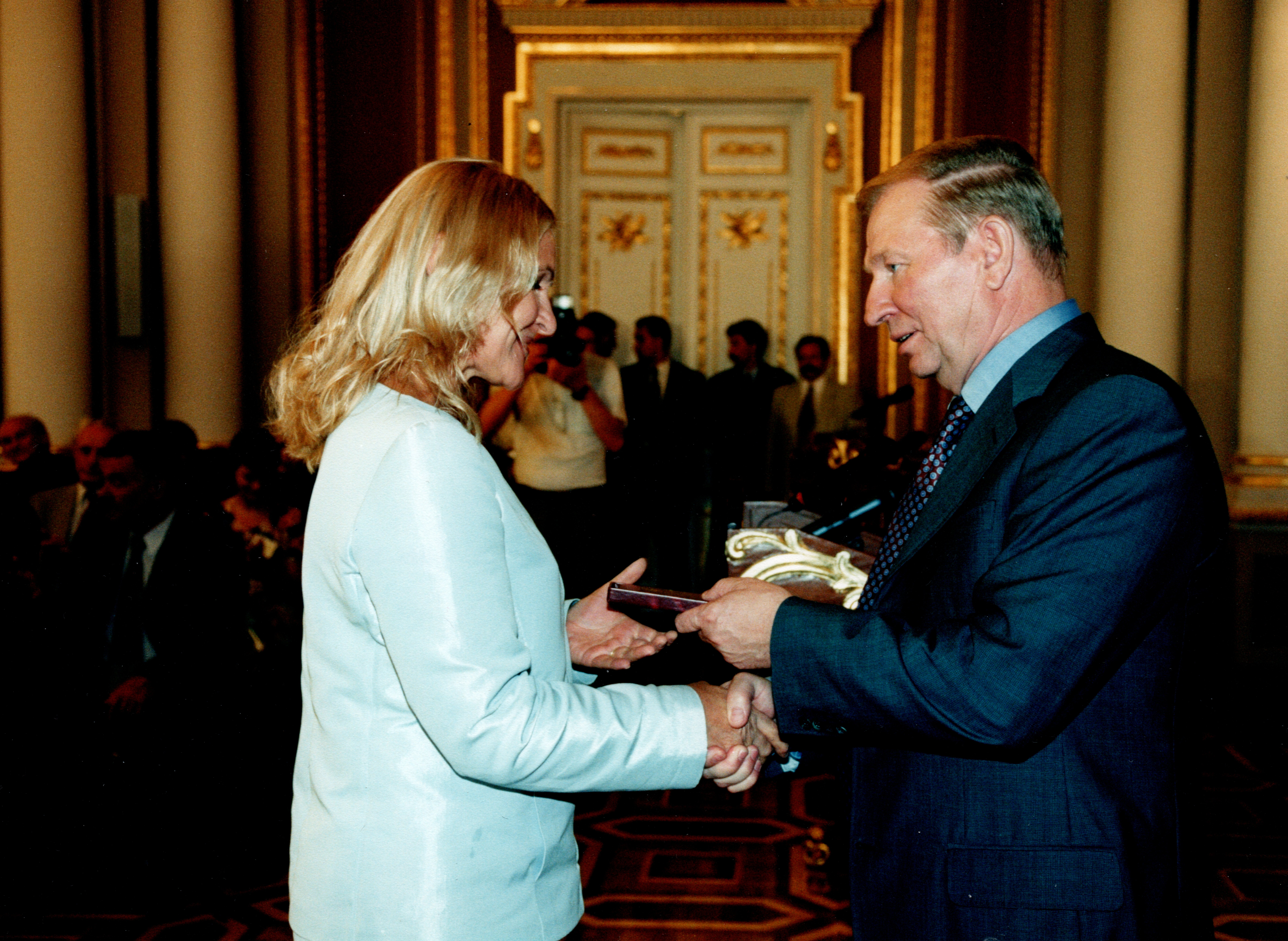 Вручення Падалко Людмилі Іванівні звання "Заслужений медик України" від Президента України Леоніда Кучми